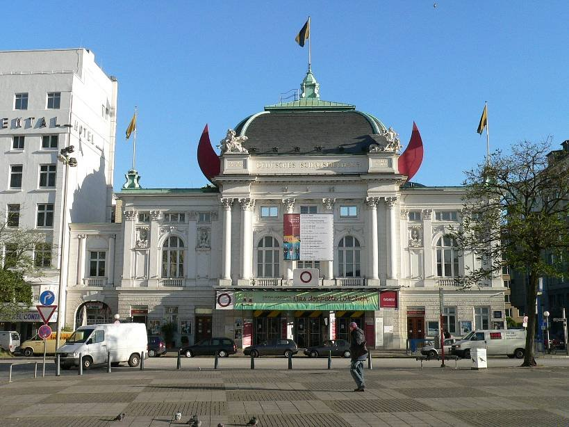 Hamburg, Germany: Deutsches Schauspielhaus This is a photograph of an architectural monument.